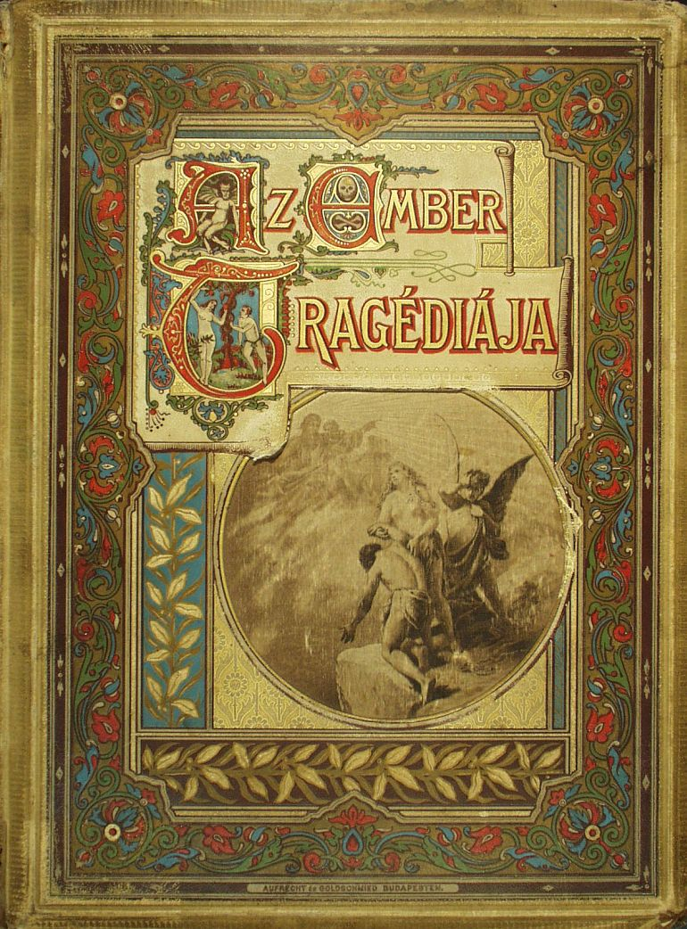 Madách Az ember tragédiája Zichy Mihály illusztrálásával az 1888-as második díszkiadás borítója